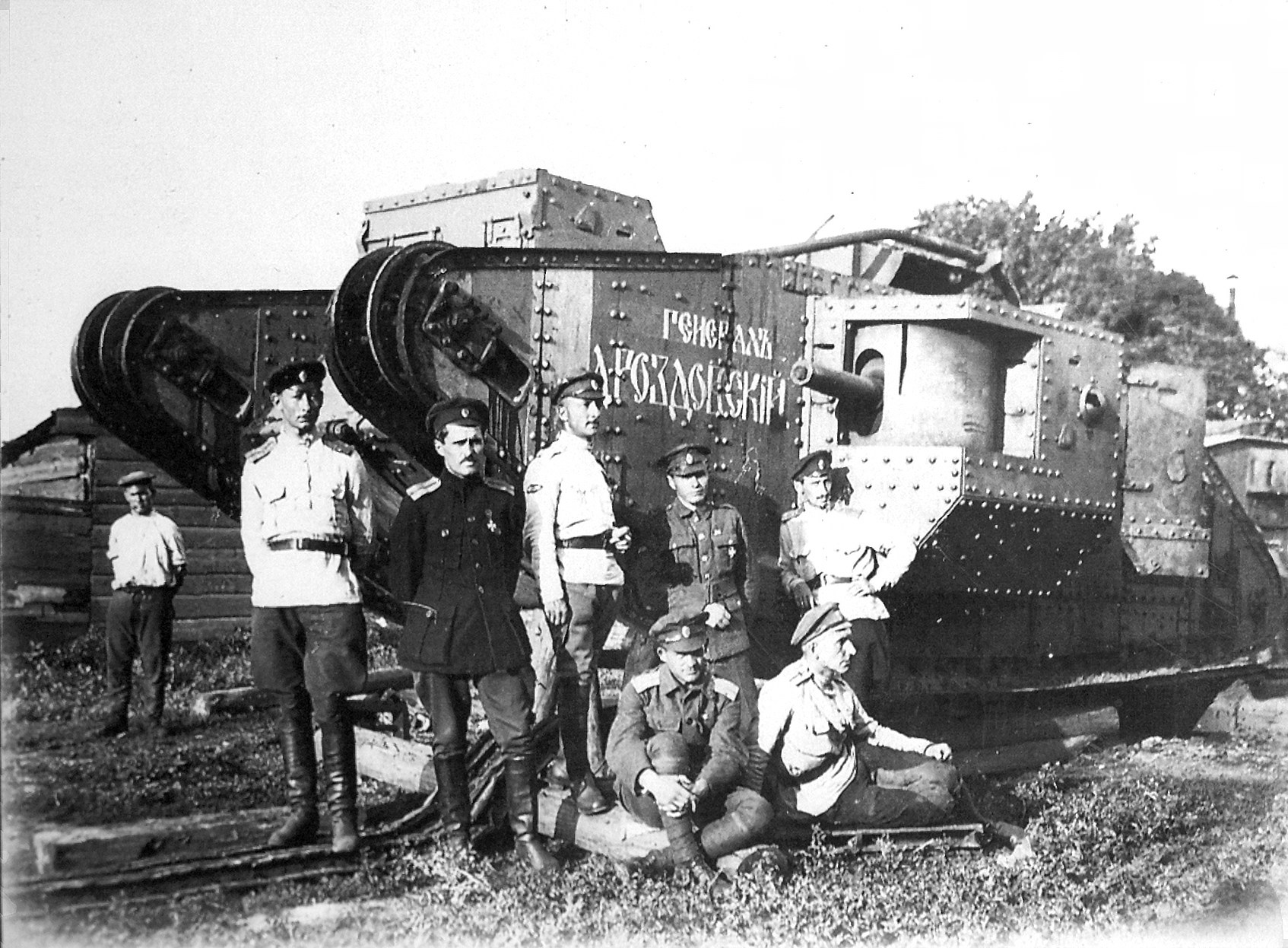 Солдаты добровольческой армии у танка «Генерал Дроздовский» (Mark V)